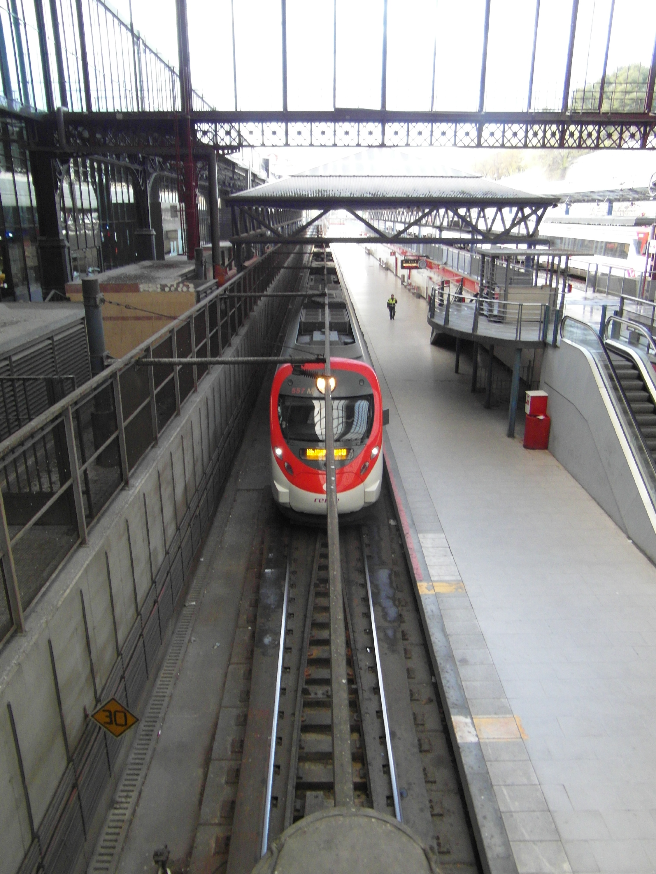 Madrid - Estación de Príncipe Pío